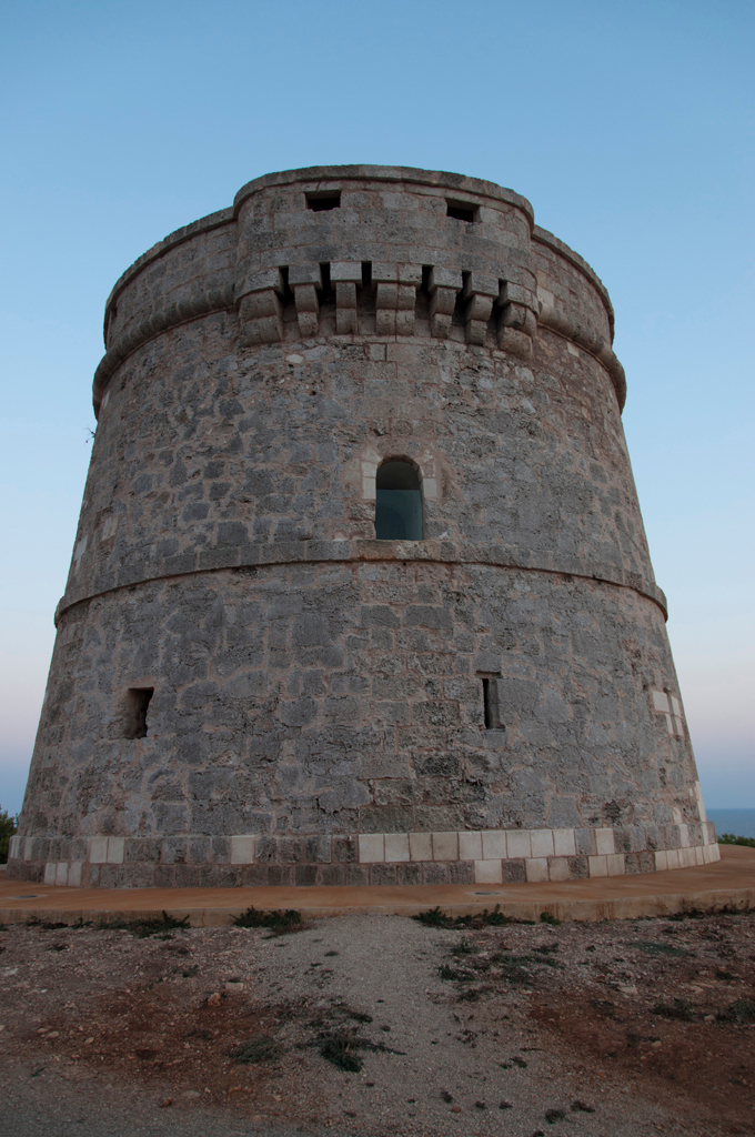 Torre de Son Ganxo (Sant Lluís)